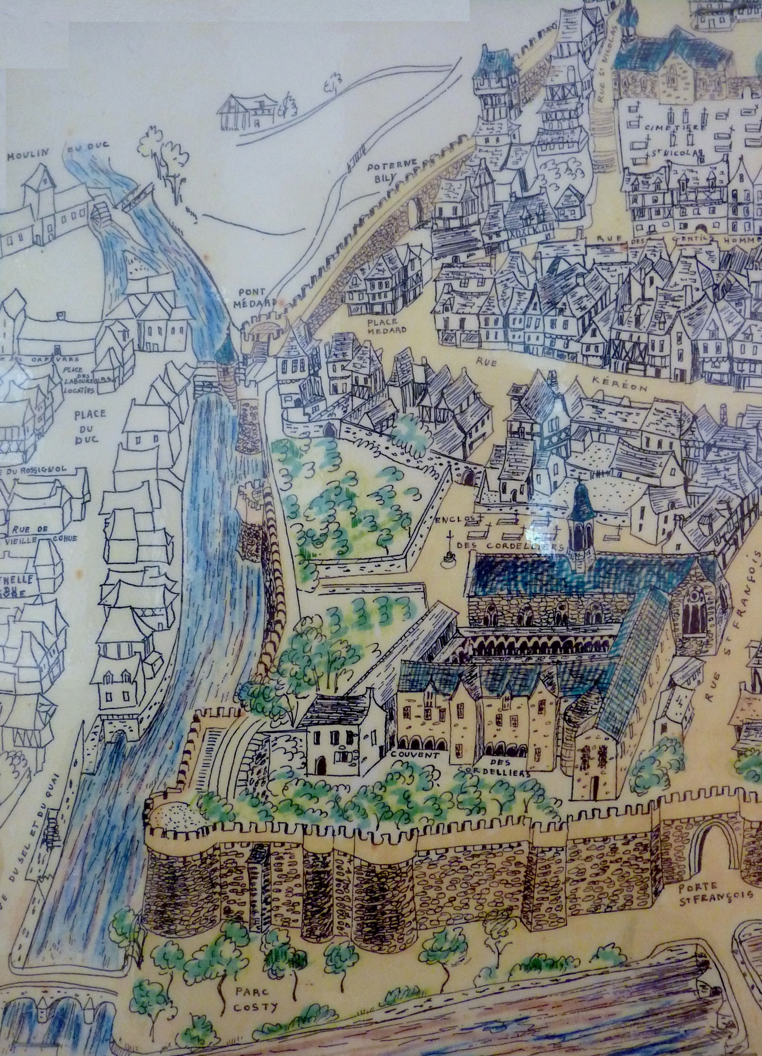 Plan de Quimper vers 1735 (par Christophe-Paul de Robien, bibliothèque municipale de Rennes). On reconnaît les remparts, la confluence du Steir avec l'Odet, le parc Costy, etc..